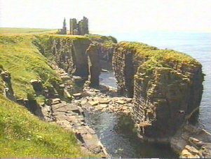 Châteaux en Ecosse (Girnigoe et Sinclair)